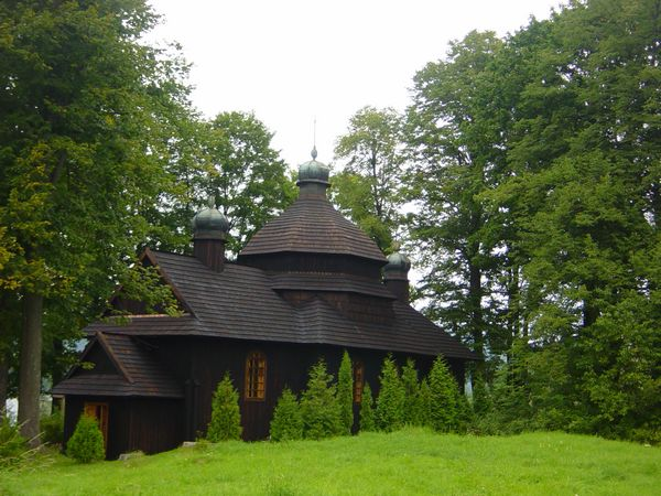 Cerkiew Narodzenia Matki Bożej w Krościenku